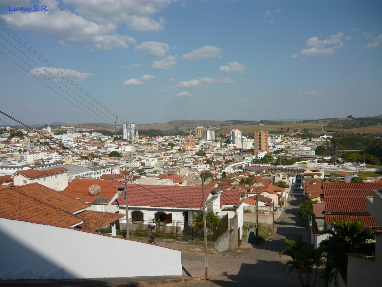 Vista parcial